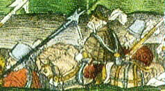 Heinrich IV. bei der Belagerung Hofs 1553, Ausschnitt